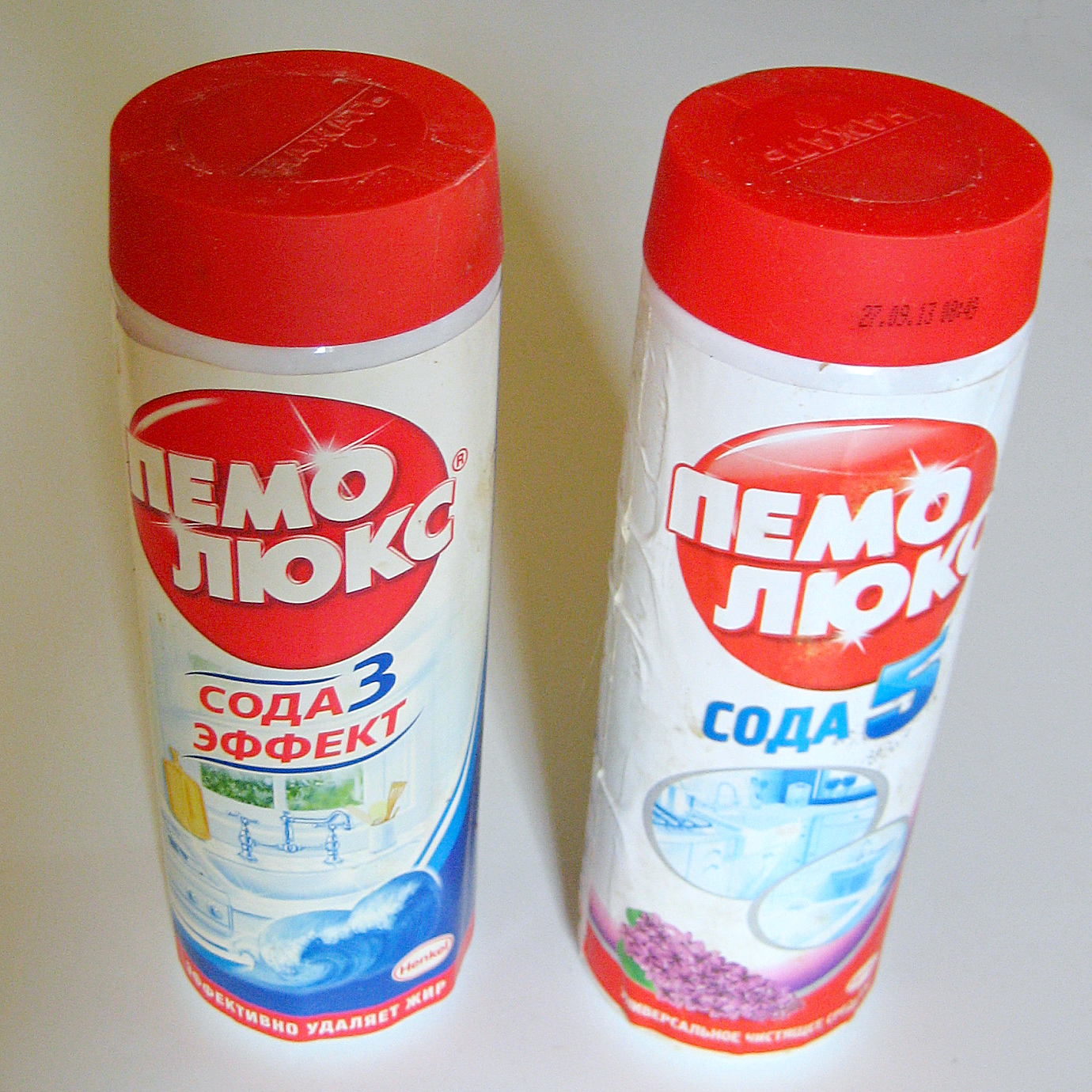 ПЕМОЛЮКС (3 и 5). Фото А. Щекинова